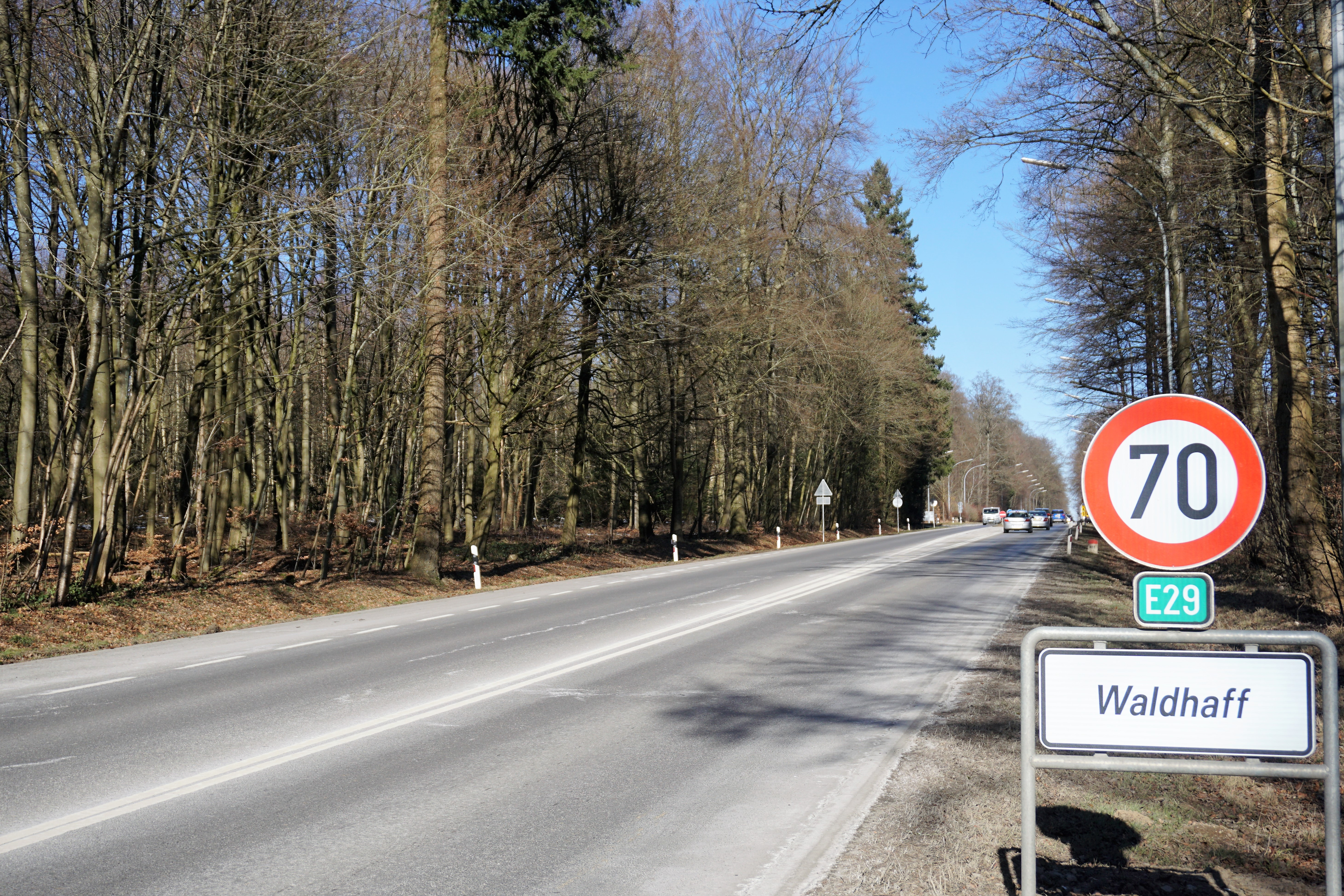 Niederanven, lieu-dit Waldhaff (Waldhof).